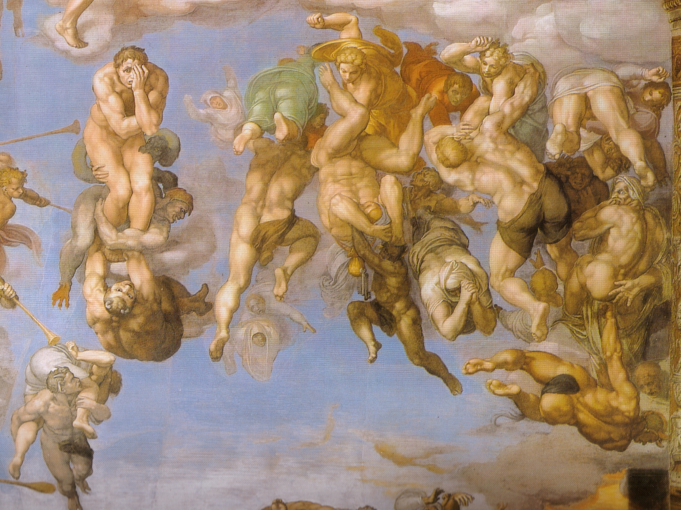 MICHELANGELO Buonarroti Last Judgment Fresco, 1370 x 1220 cm Cappella Sistina, Vatican